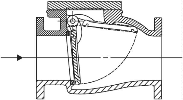 احد انواع الصممات ويدعى صمام عدم رجوع